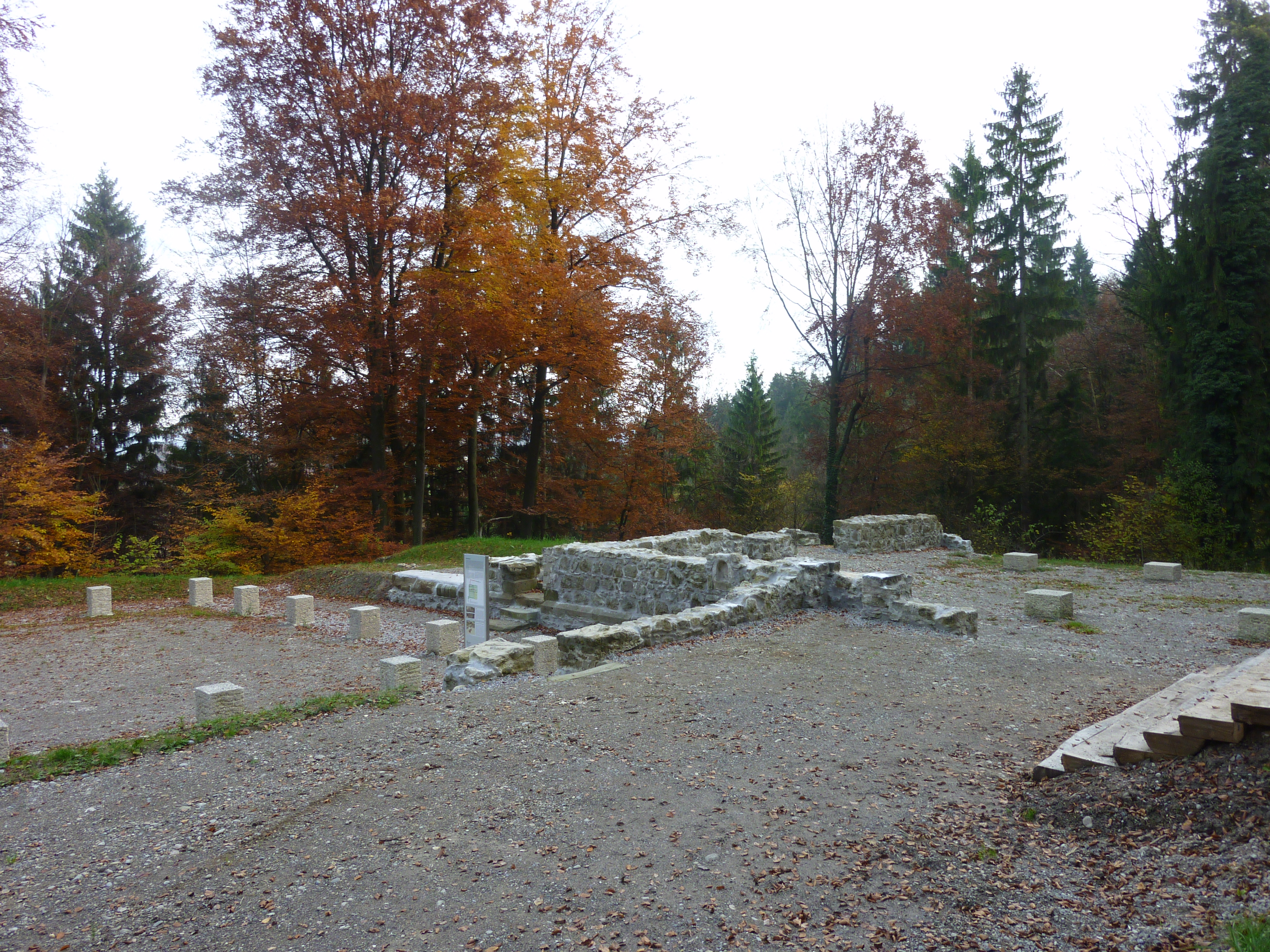 Kloster Beerenberg bei Winterthur-Wülflingen Kreuzgang links, Konventshaus